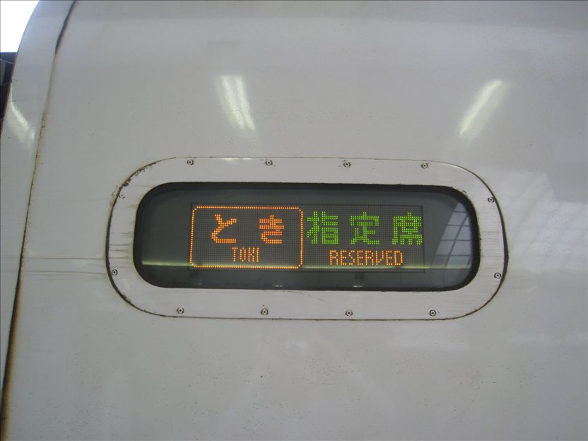 とき 電光表示